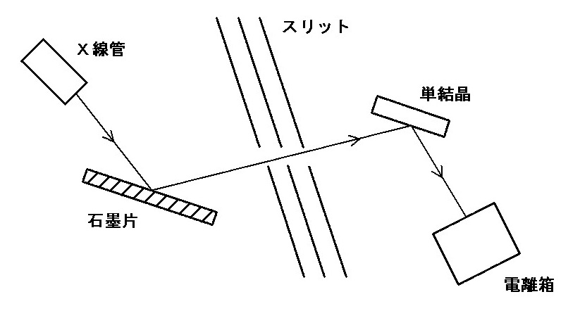 コンプトンの実験図